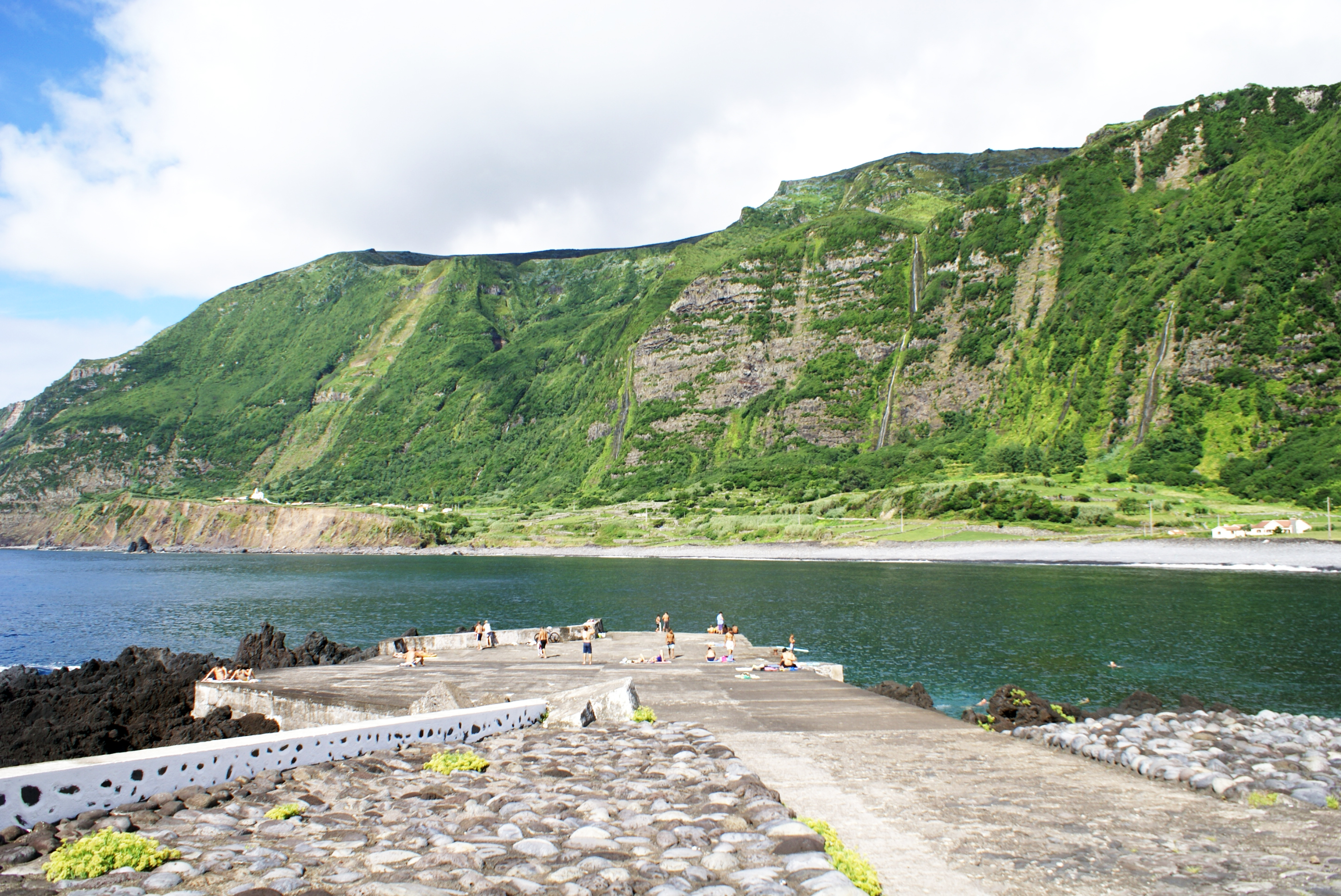 Porto e zona balnear da Fajã Grande, ilha das Flores, Açores, Arquivo de Villa Maria, ilha Terceira, Açores